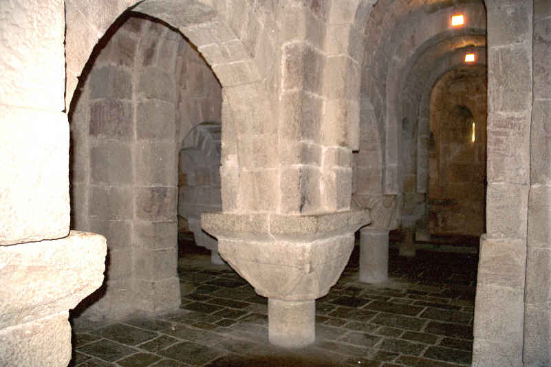 Cripta del Monasterio de Leyre en Yesa en la provincia de Navarra, (España).